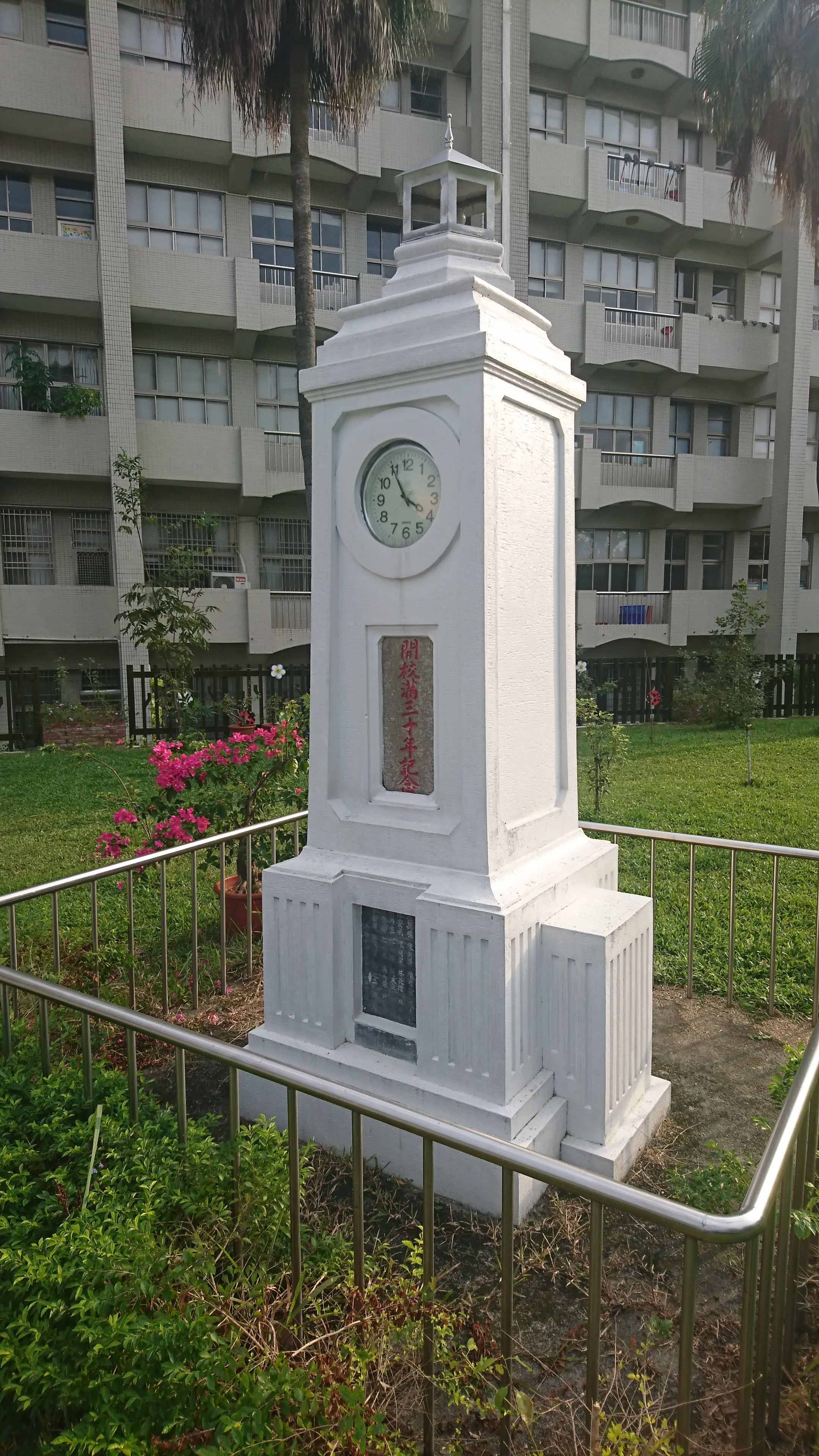 臺灣嘉義市崇文國小創校30週年紀念鐘，建於1928年，為紀念創校三十週年，由第十三屆的畢業校友集資，於當時的校門口設置一座時鐘塔，設計人為蔡天助先生。